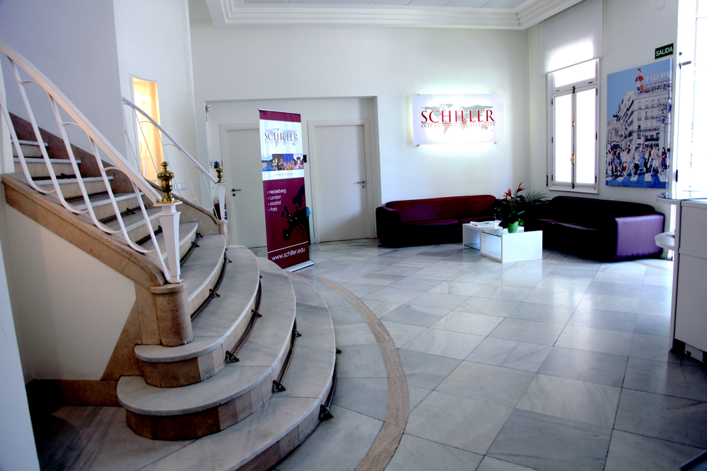 Campus de Schiller International University Madrid